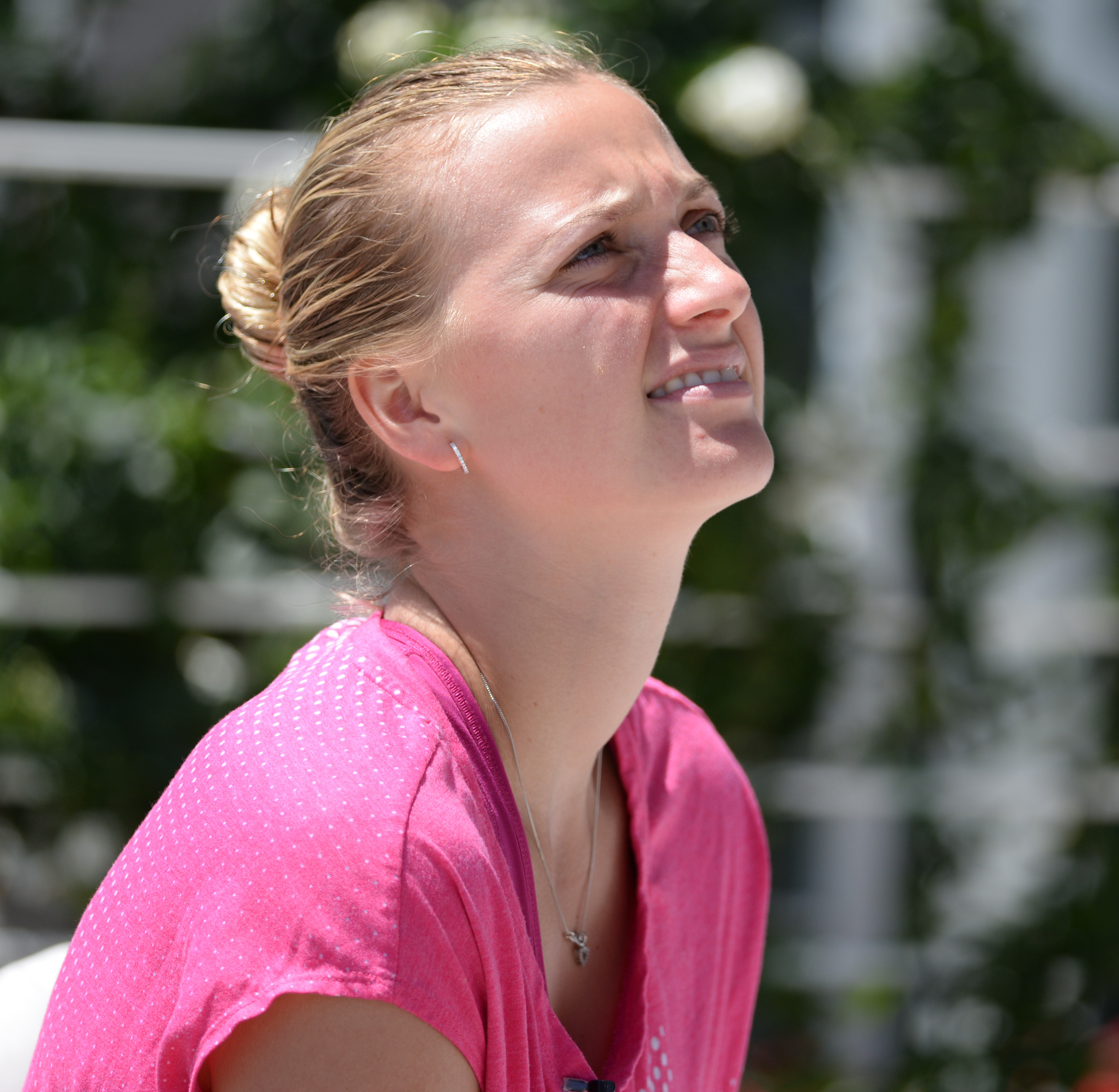 Petra Kvitova